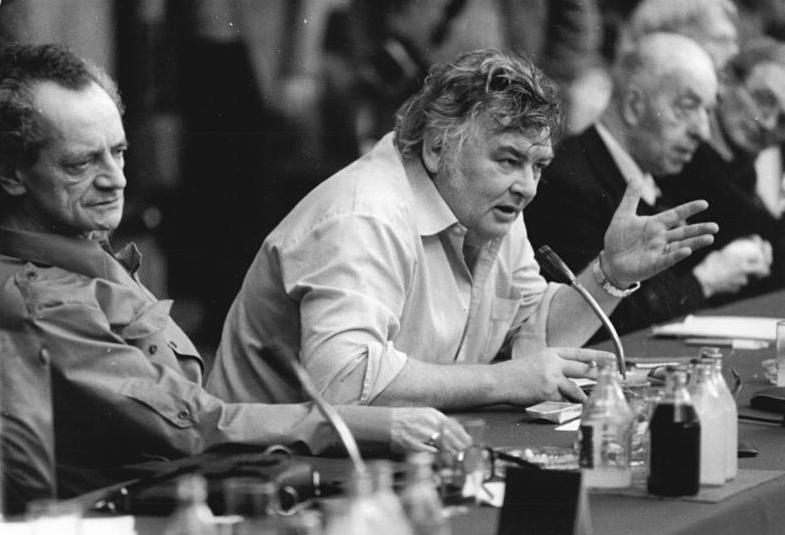 Berlin, Noll, Neutsch, Kuczynski ADN-ZB Junge 4.1.82 Berlin: An der "Berliner Begegnung zur Friedensförderung" von Schriftstellern, Künstlern und Wissenschaftlern aus europäischen Ländern am 13. und 14.12.81 nahmen aus der DDR u. a. die Schriftsteller Dieter Noll (l.) und Erik Neutsch (M.) sowie der Wissenschaftler Prof. Dr. Jürgen Kuczynski (r.) teil. Abgebildete Personen: Noll, Dieter: Schriftsteller, DDR (GND 119157322) Neutsch, Erik: Schriftsteller, DDR (GND 118734687) Kuczynski, Jürgen Prof. Dr.: Volkswirtschaftler, Wirtschaftshistoriker, Mitglied der Akademie der Wissenschaften (AdW), DDR (GND 118567462)